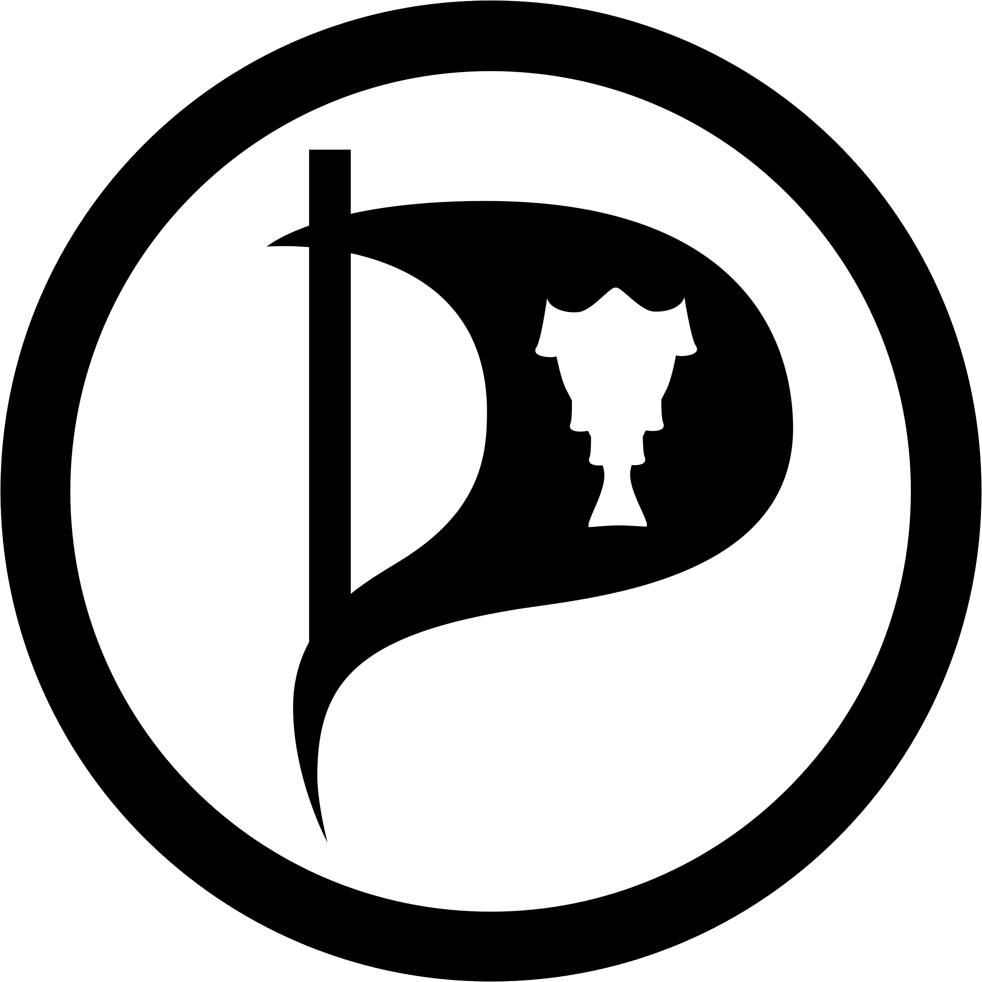 Lógó íslenskra Pírata. Frummyndin er frá sænskum pírötum og er PD. Viðbótin hefur ekki þá verkhæð að mynda sjálfstæðan höfundarétt.